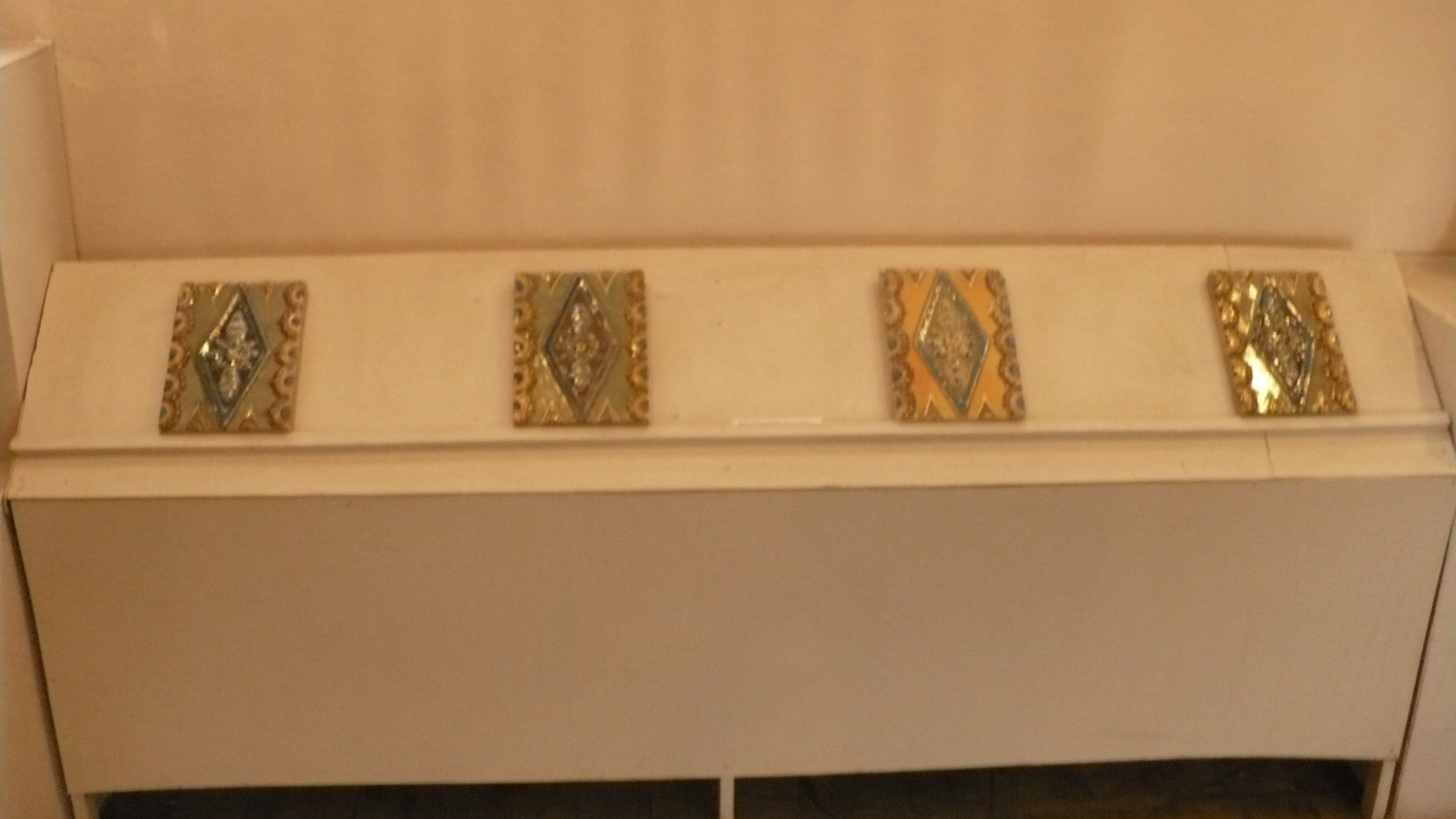 Миргородський Краєзнавчий музей (усередині 86). Внутрішній вигляд Миргородського Краєзнавчого музею